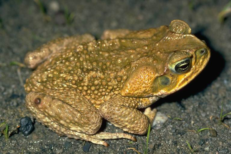 Bufo marinus